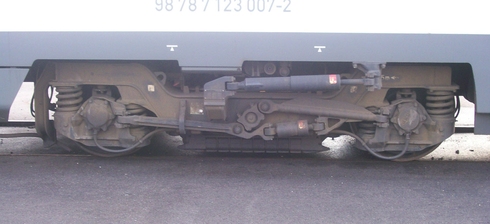 Podvozje nagibnog vlaka HŽ 7123